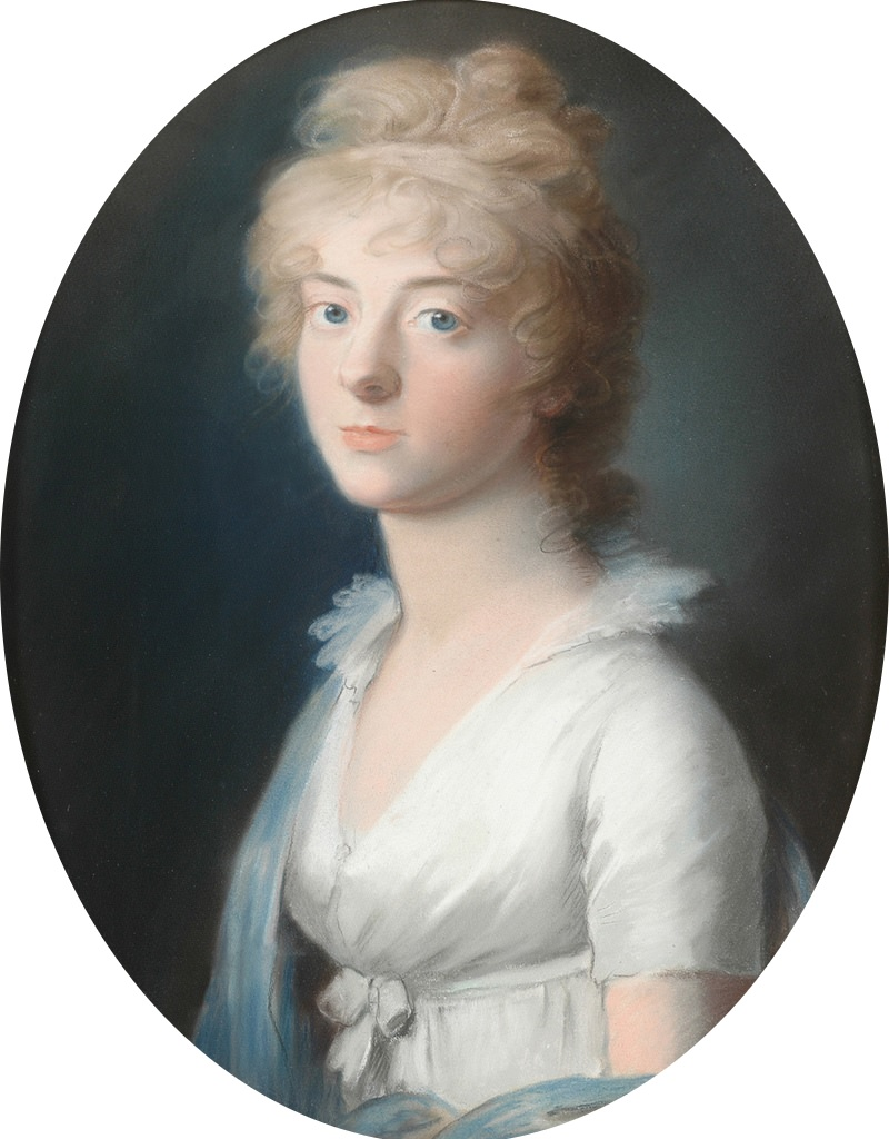 Беларуская (тарашкевіца): Партрэт Людвікі Радзівіл (Ludvika Radzivił) з Гогенцолернаў (Hohenzollern)